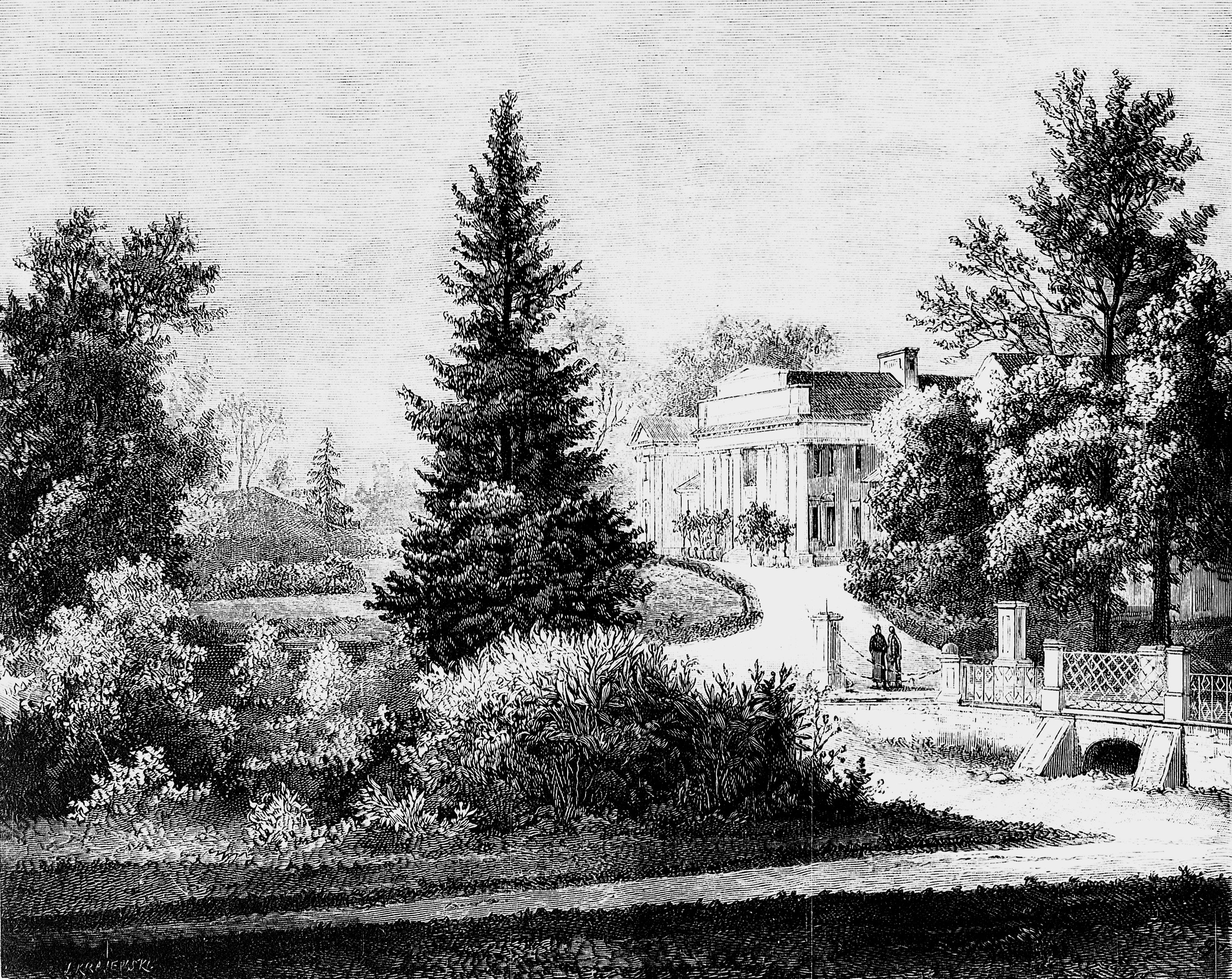 Беларуская (тарашкевіца): Лагойск (Łahojsk), Палац Тышкевічаў (Tyškievič)